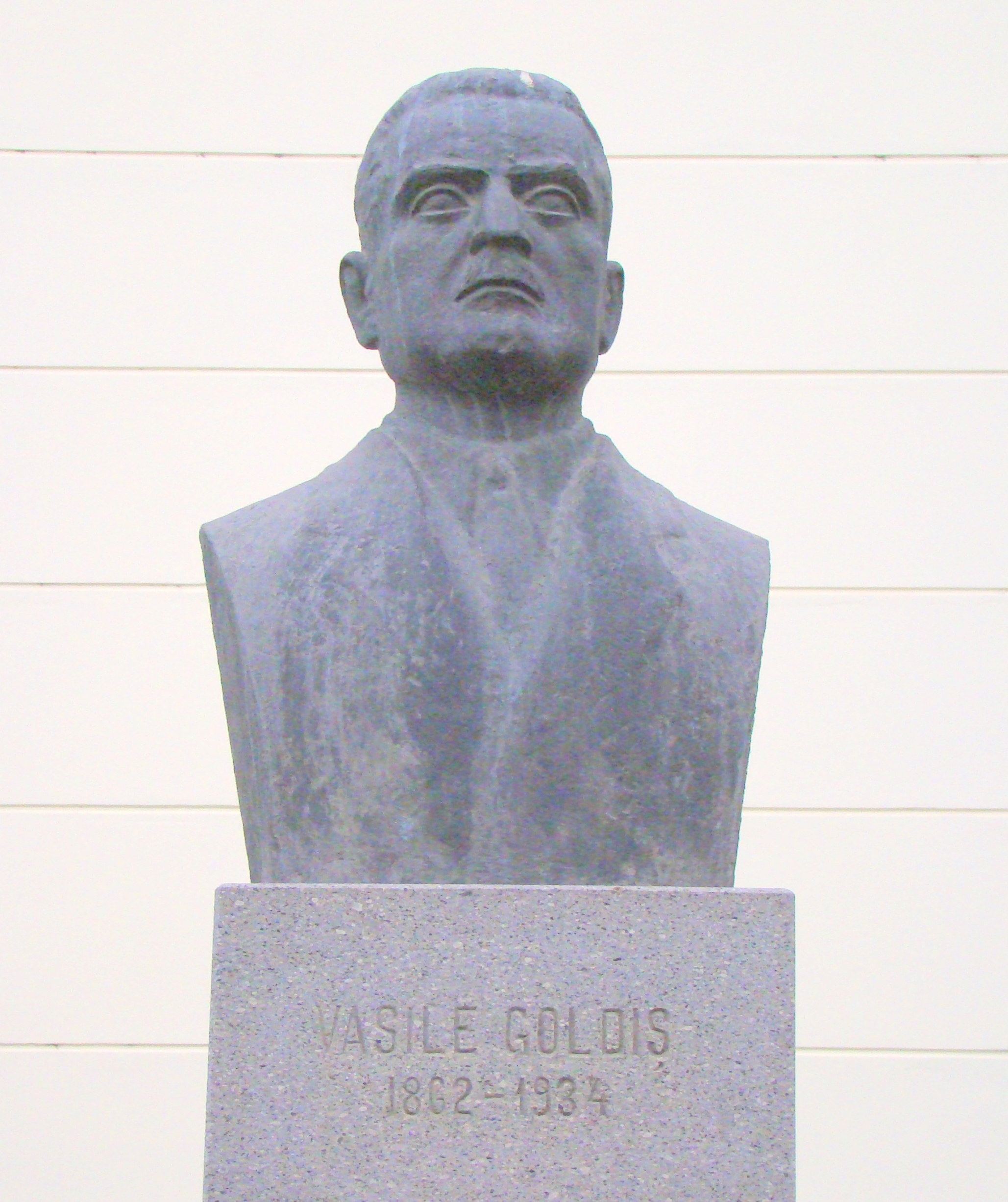 Bustul lui Vasile Goldiş din Alba Iulia